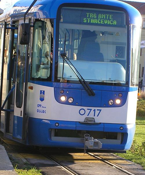 An tramway in Osijek